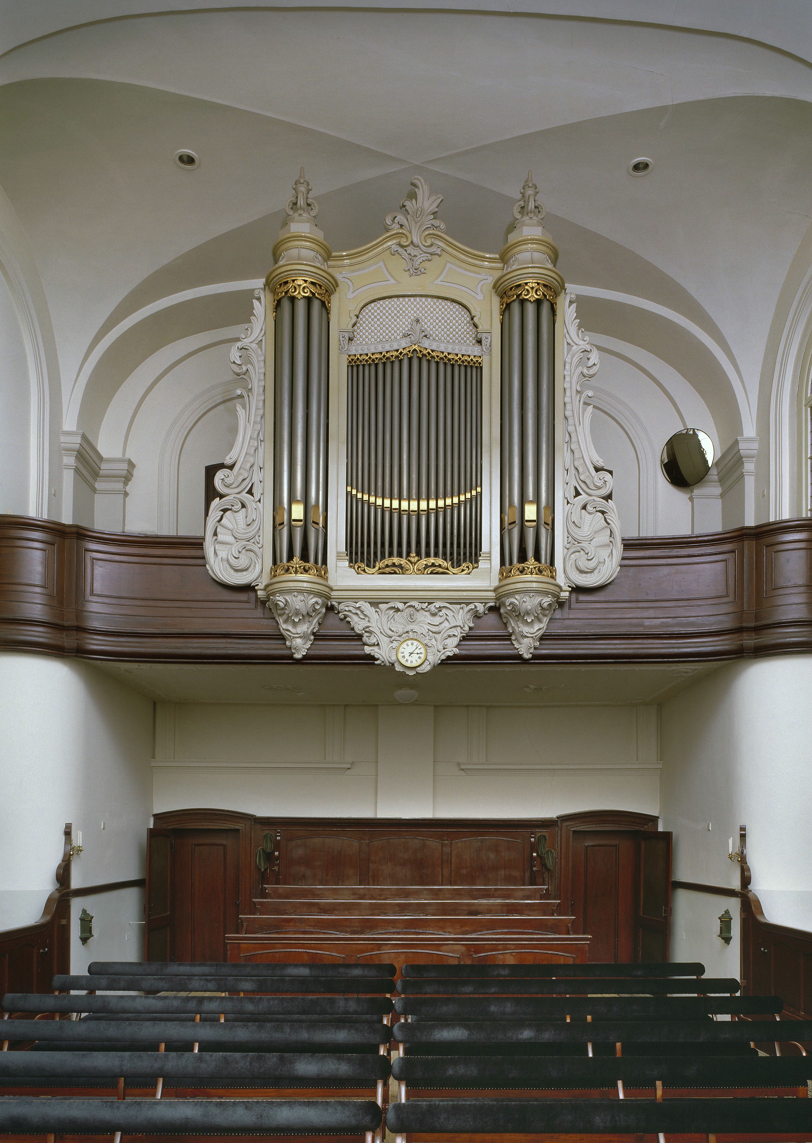 Doopsgezinde Kerk: Interieur, aanzicht herenbank en orgel, orgelnummer 1508 (opmerking: Gefotografeerd voor Het Historische Orgel in Nederland 1865-1872)